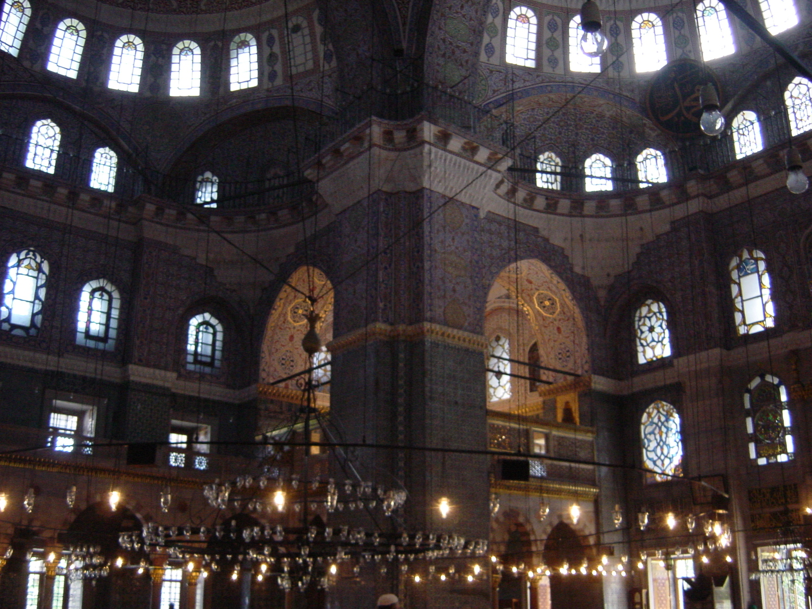 L'interno della Yeni camii ("la Moschea nuova"; pronuncia: "Ieni giamìi") d'Istanbul. Foto di: Giovanni Dall'Orto, 27-5-2006.